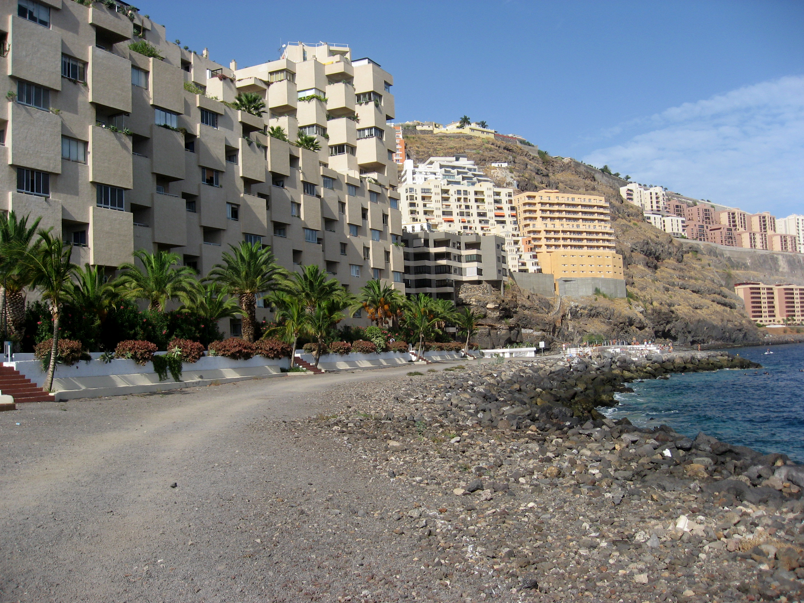 Tabaiba baja